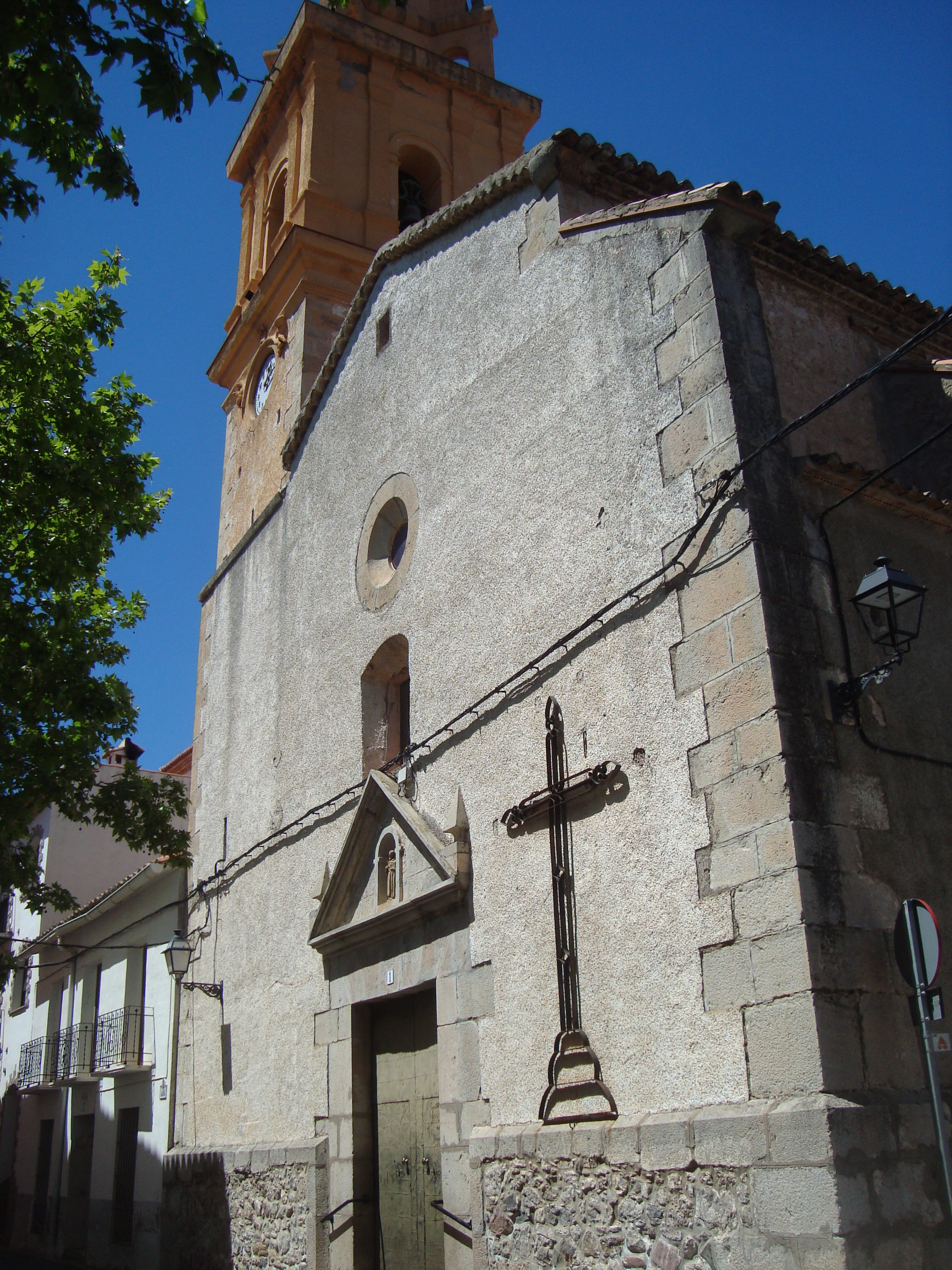 Església parroquial de Sant Bernadí (Cirat) 08.046-006.